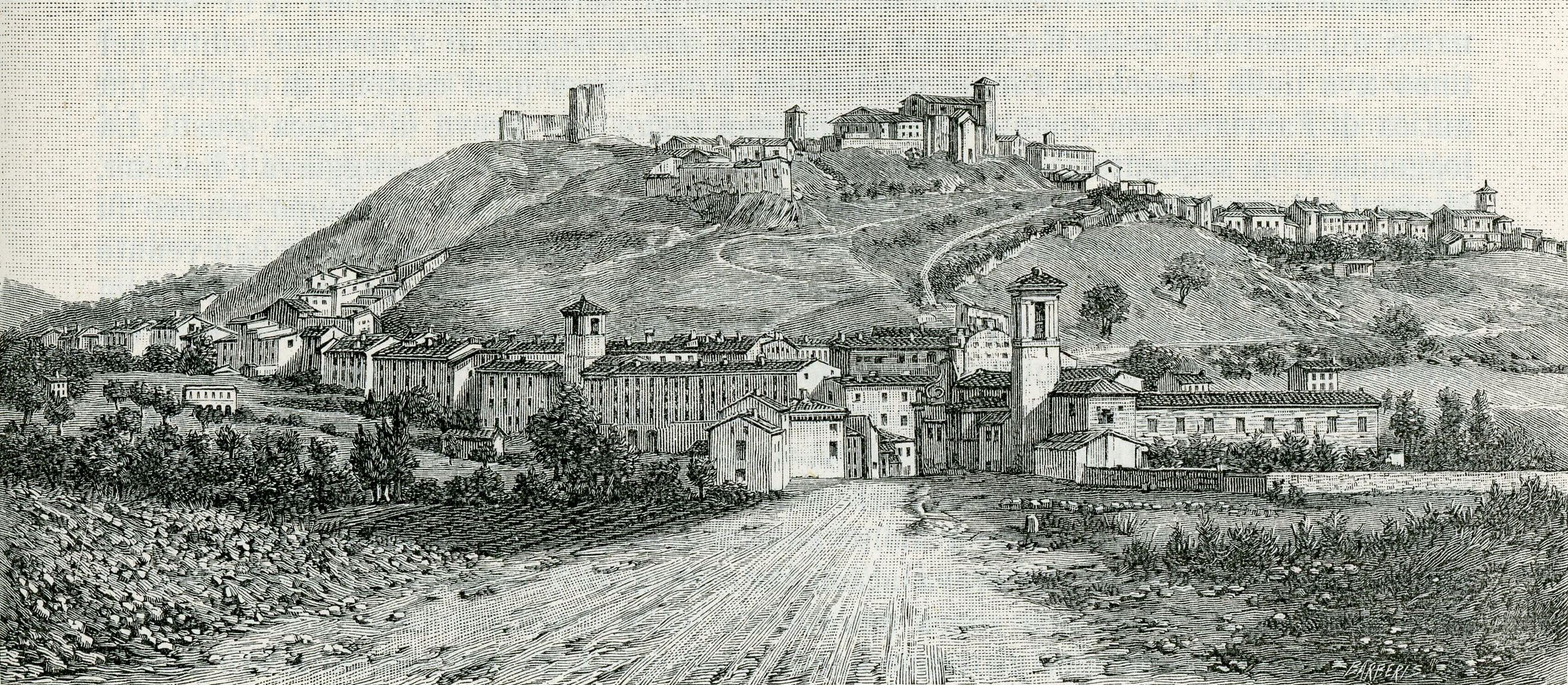 Sassoferrato: Veduta del paese (xilografia).